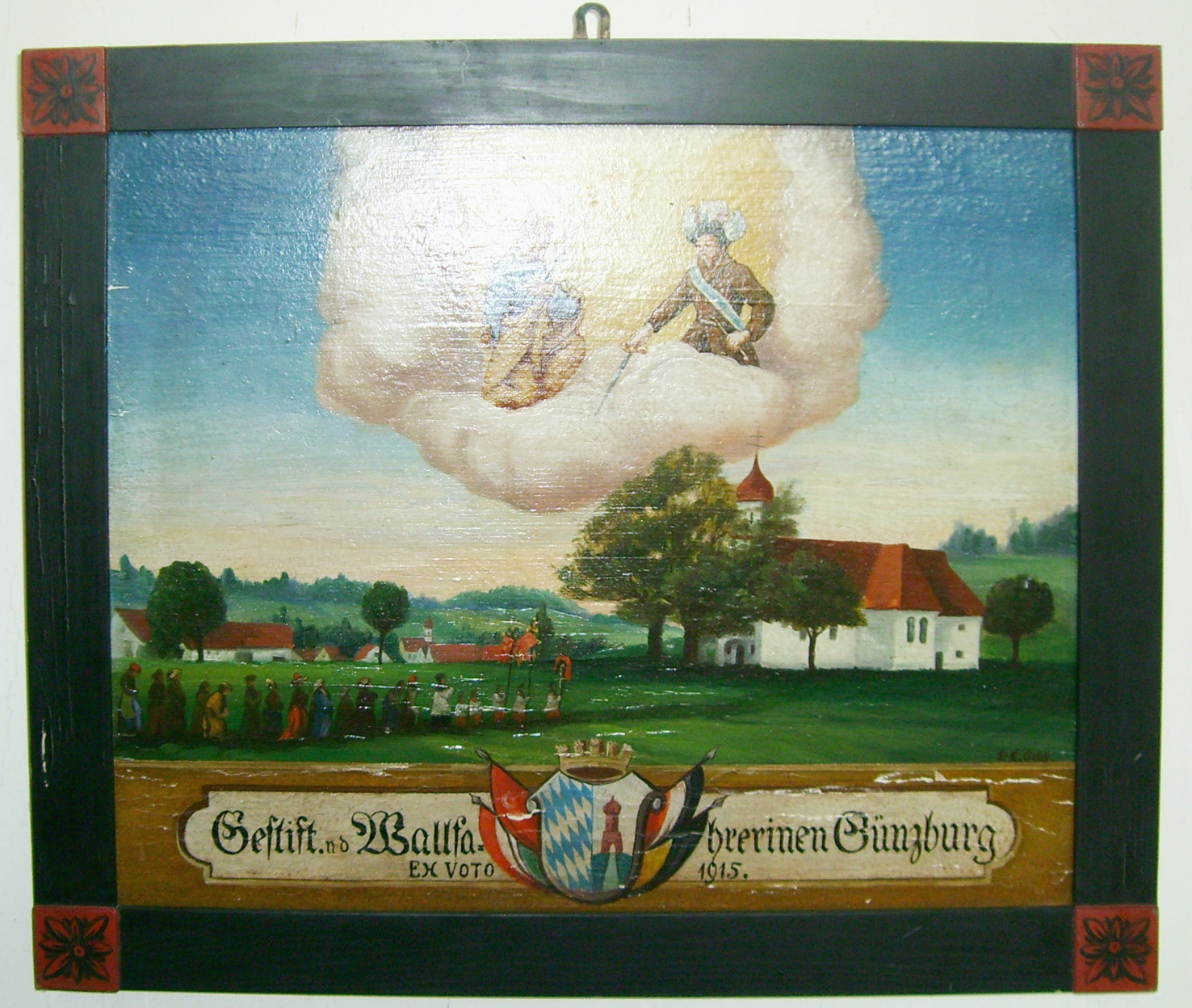 Votivbild of Heilig Kreuz (Mindelaltheim)